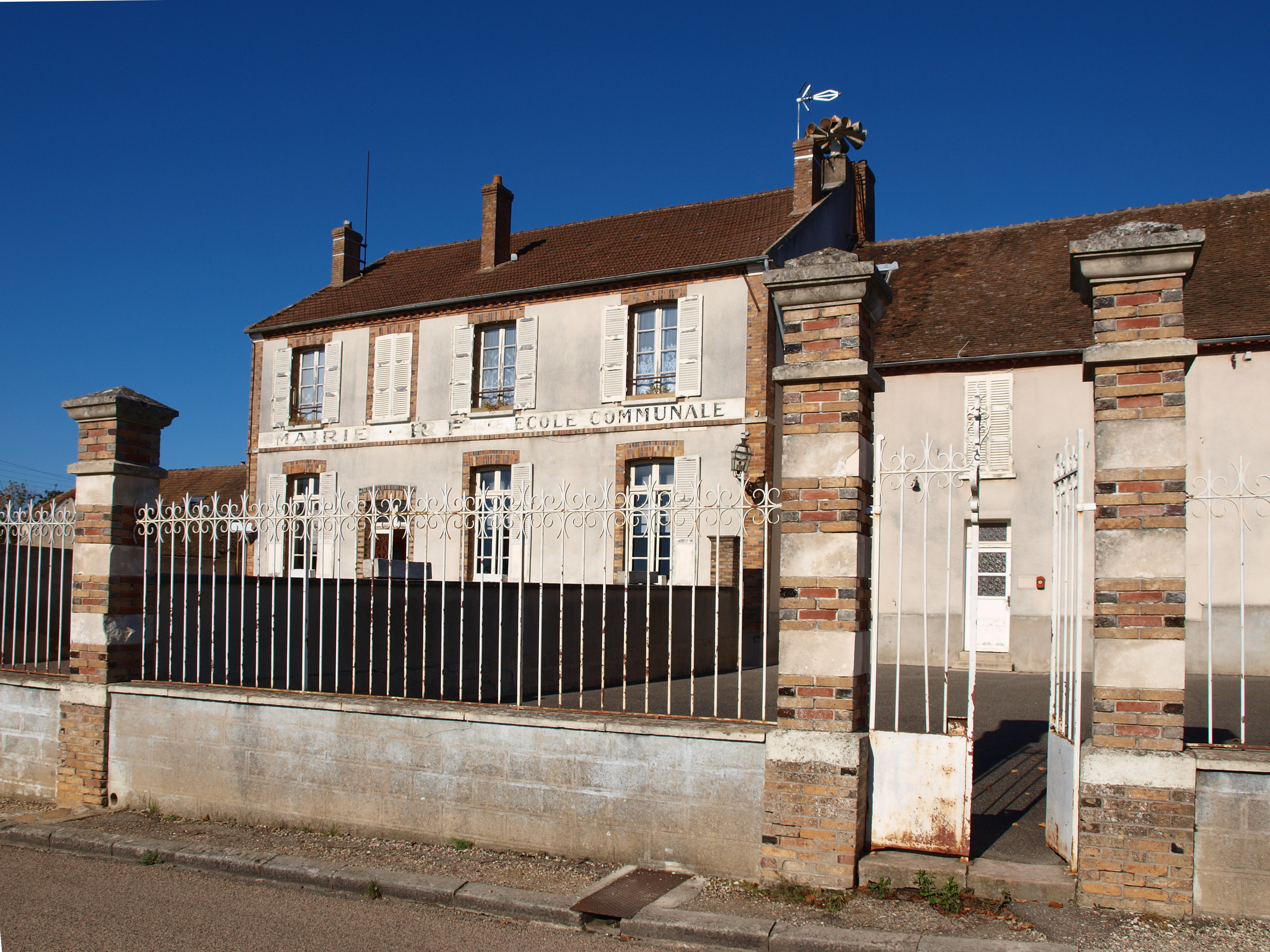 Vinneuf (Yonne, France) ; les écoles